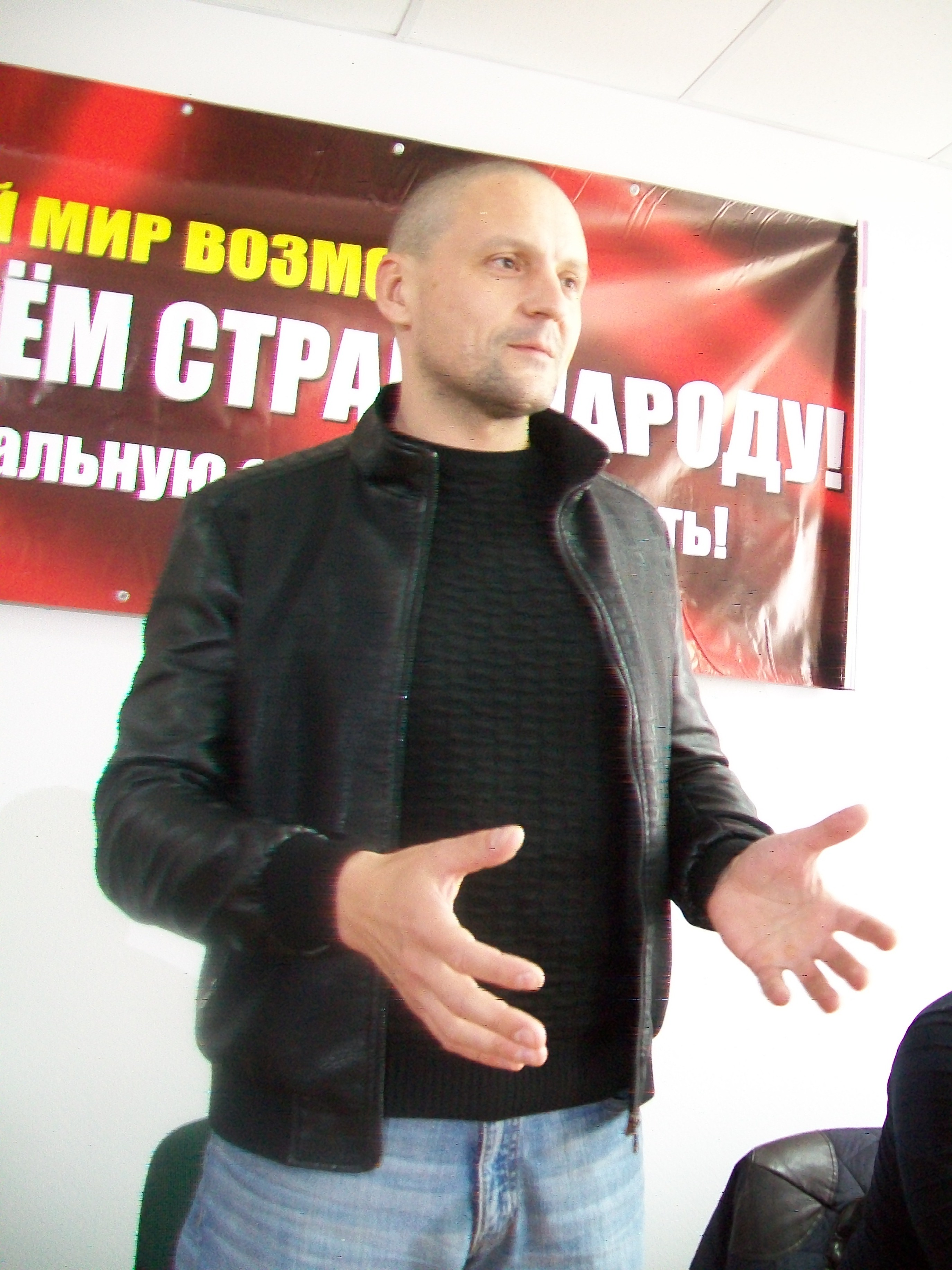 Сергей Удальцов в Екатеринбурге 2 июня 2018 года